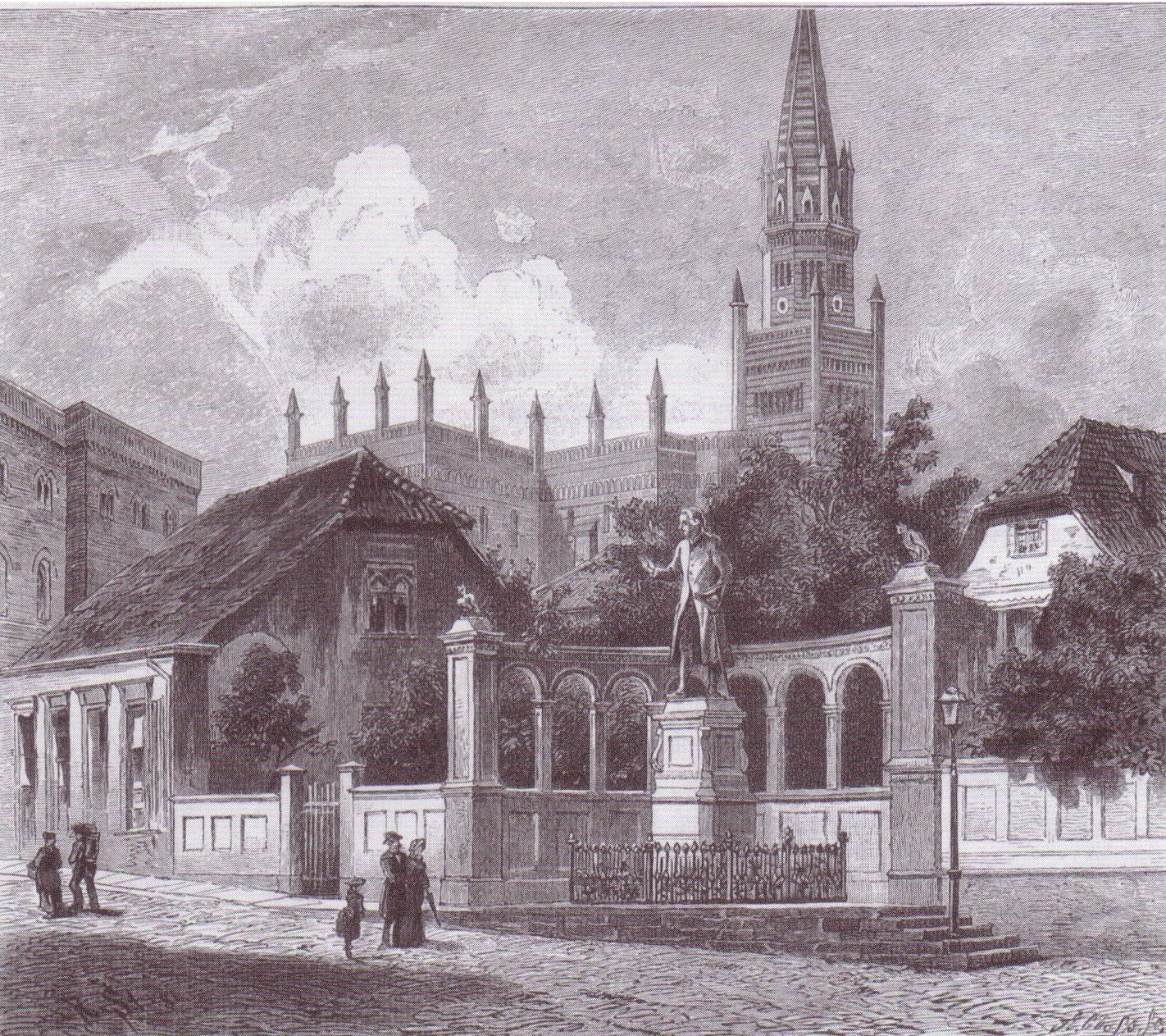 Bild des Kant-Denkmals in Königsberg an seinem ersten Platz, im Hintergrund die Altstädtische Kirche